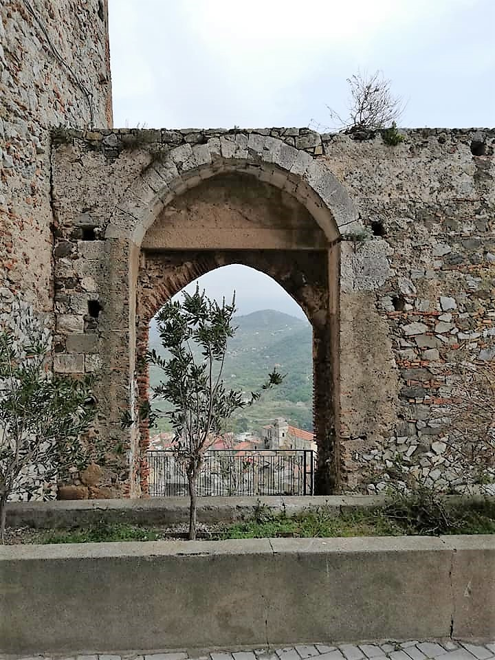 Porta di Levante.